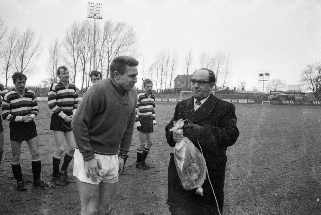 im Holsteinstadion. Der 2. Vorsitzende von KSV Holstein Kiel Willi Gruß (vorn rechts) überreicht Stürmer Gerd Koll (vorn links) zu dessen 401. Spiel für Holstein Blumen.